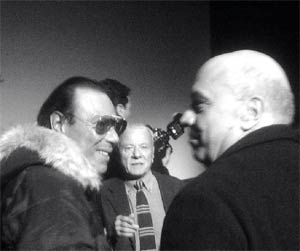 Antonello Venditti, Achille Bonito Oliva e Massimiliano Fuksas